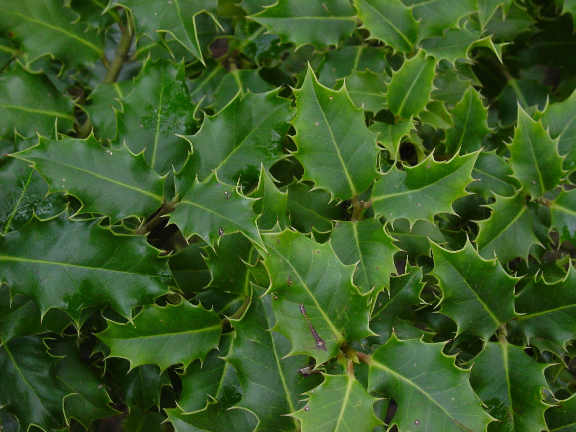 self made. Santiago de Compostela. Alameda.